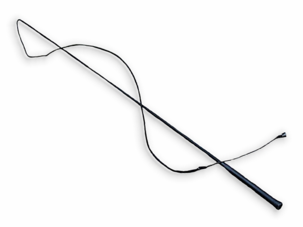 Bat (jeździectwo) - pomoc przy lonzy